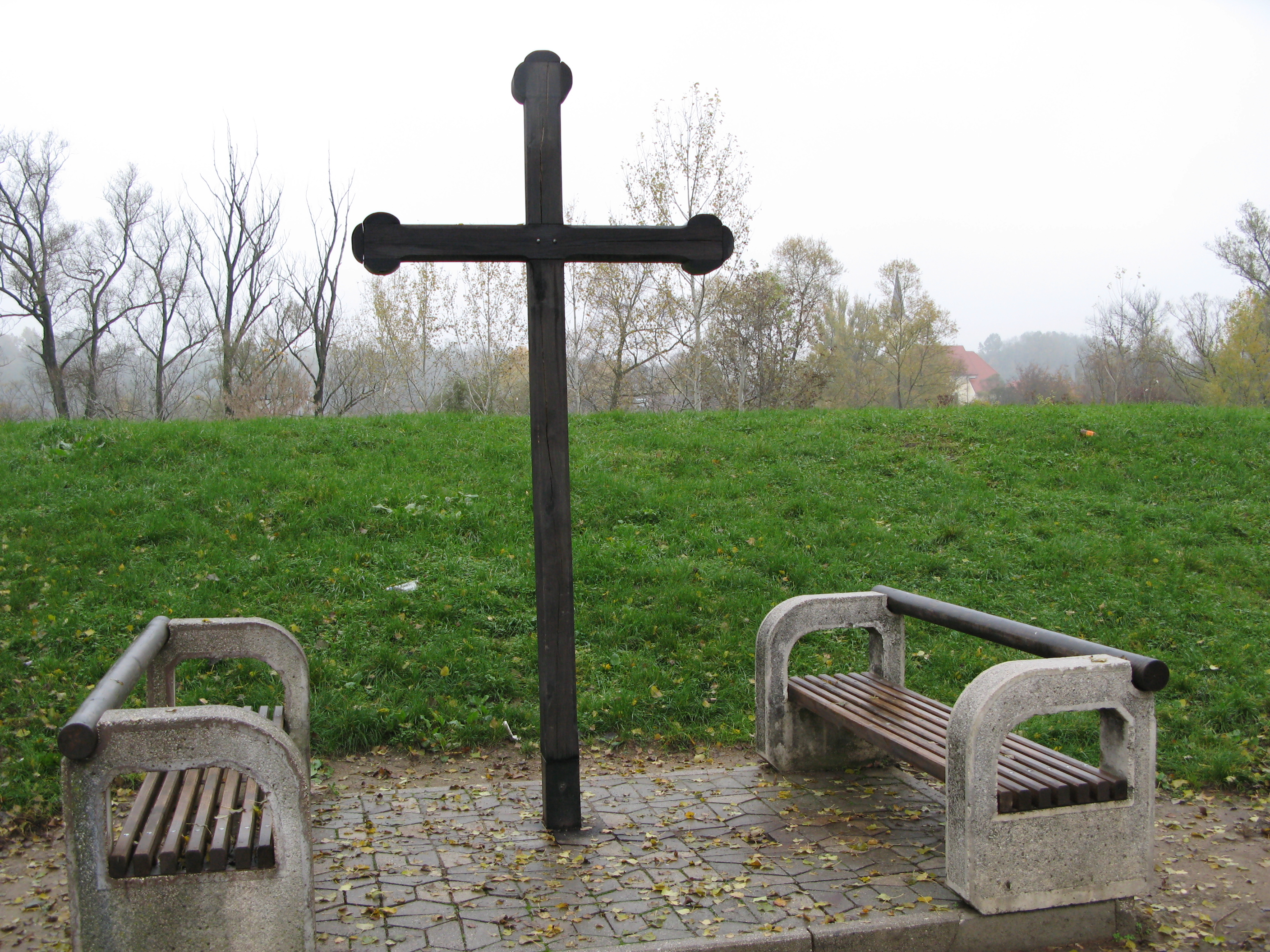 Spomen krst, Kozarska Dubica.